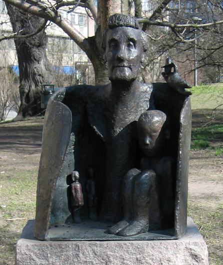 Skulptur föreställande Astrid Lindgren, gjord av Majalisa Alexanderson rest 1996 i Tegnérlunden, Stockholm. Gåva av Eva Bonniers donationsnämnd.